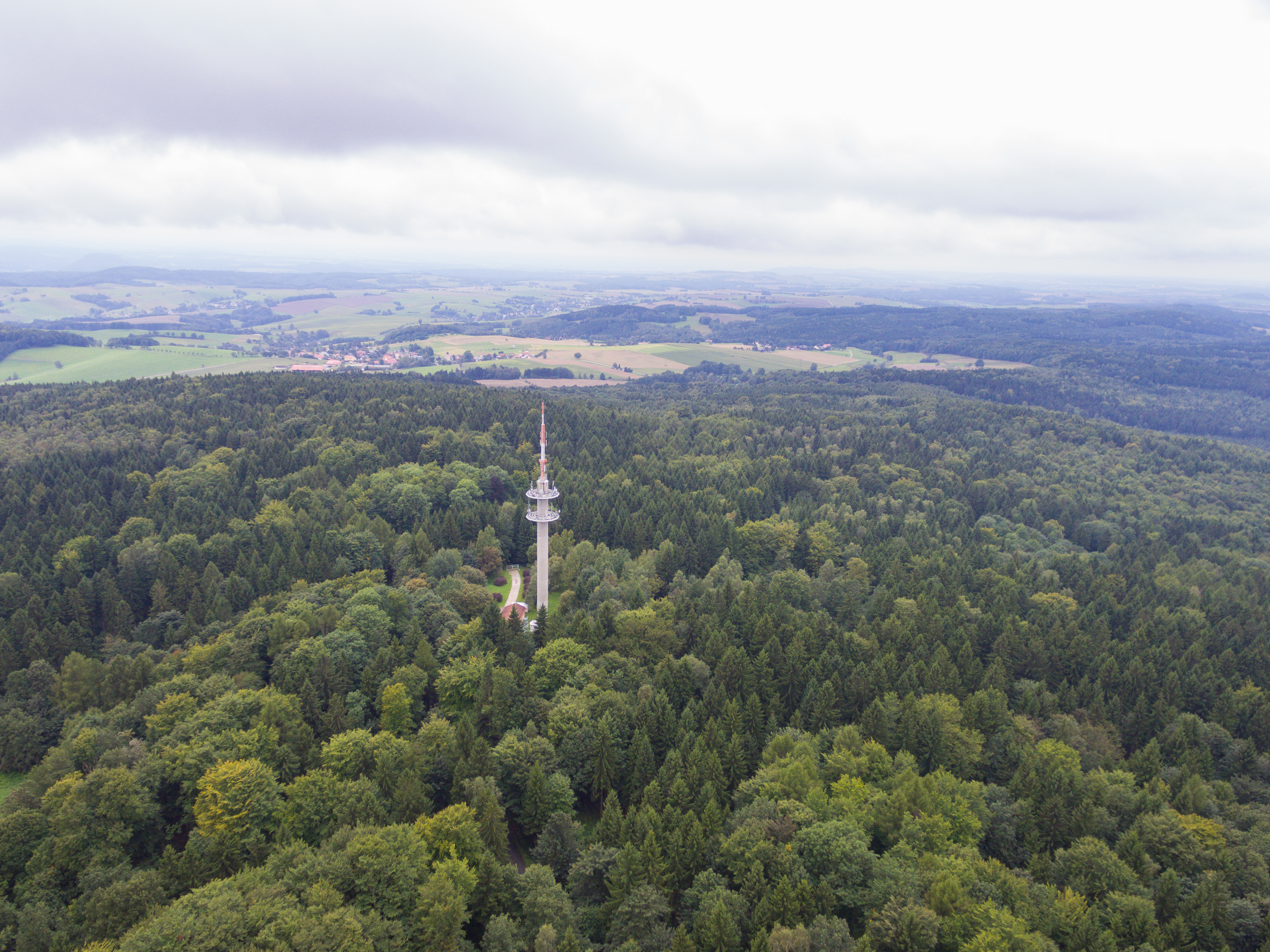 Fernmeldeturm Ungerberg